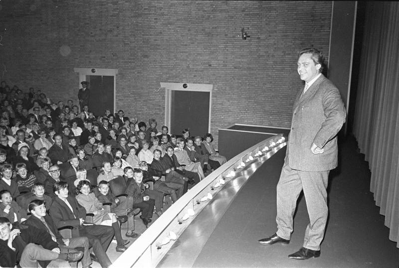 Dirch Passer (1926-1980) på scenen i Apollo Teatret i Odense. Optræden før spillefilmen Pigen og millionæren blev vist